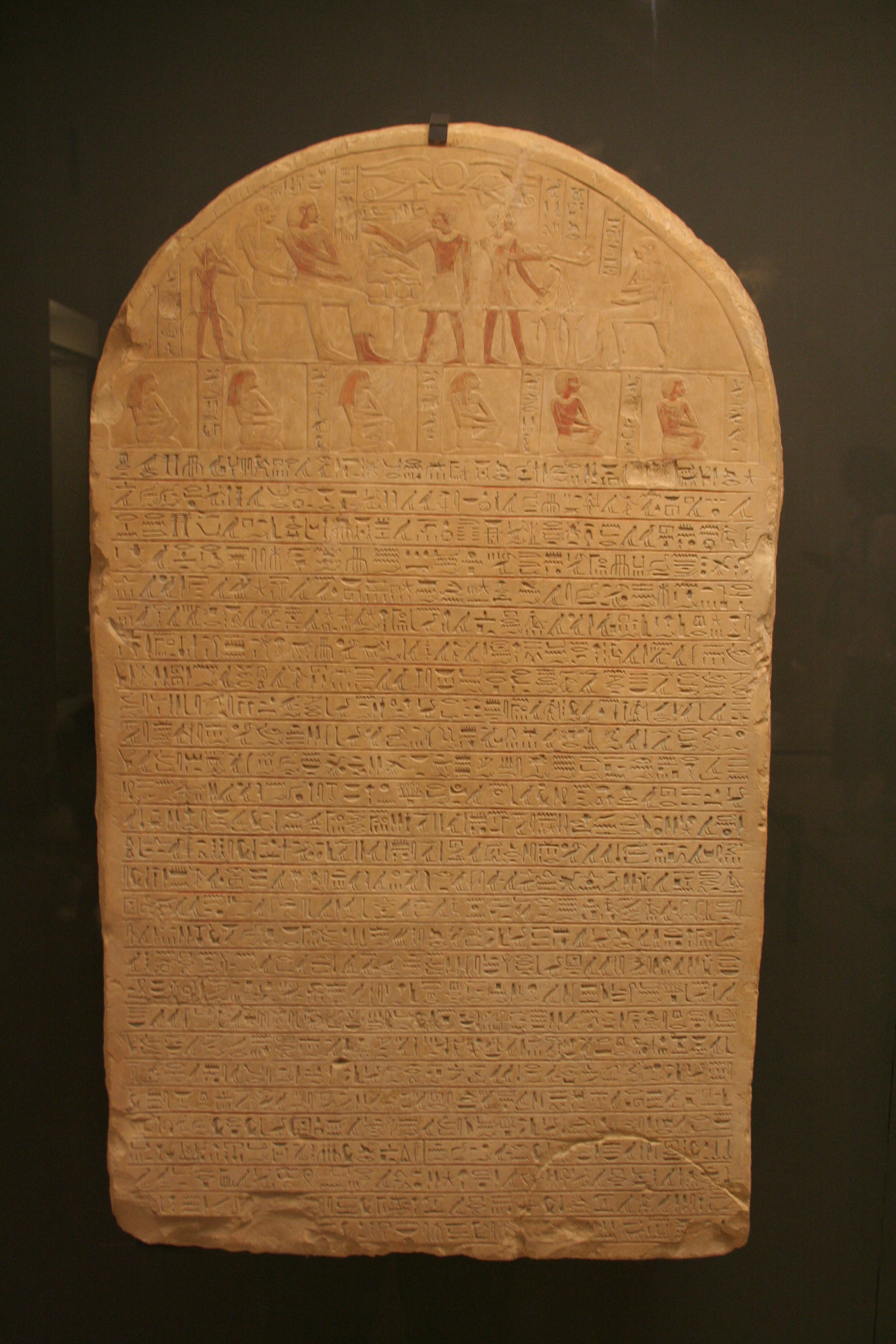 Hymne d'Imenmès, chef des troupeaux d'Amon, calcaire